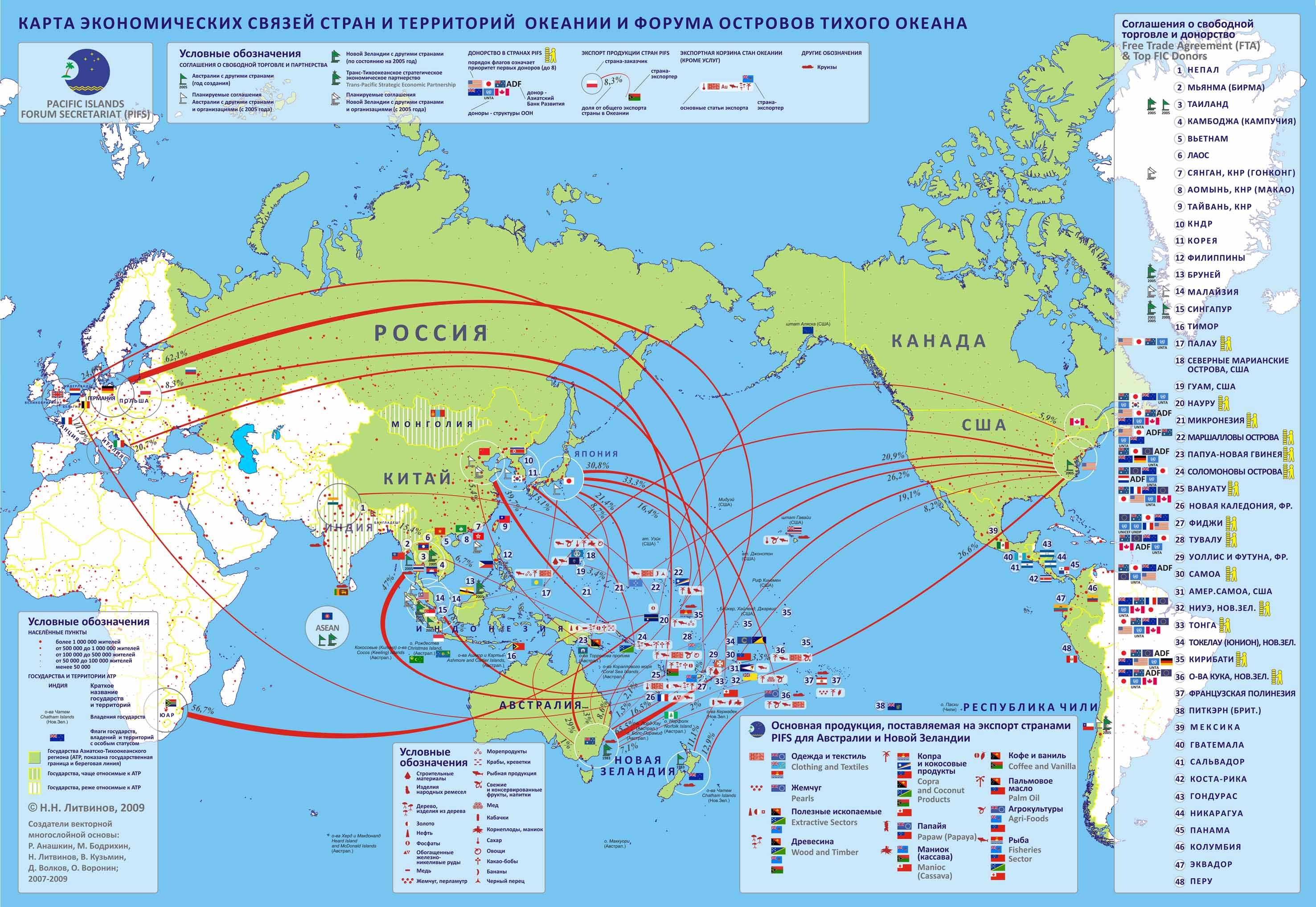 Карта «Экономика Океании» (для статьи Океания). Источник: Литвинов Н.Н. Стратегический менеджмент на примере Азиатско-Тихоокеанского региона. Монография. — М., 2010. — 200 [10] с. — (Strategic Management in the Asian-Pacific) - ISBN 978-5-91252-029-7